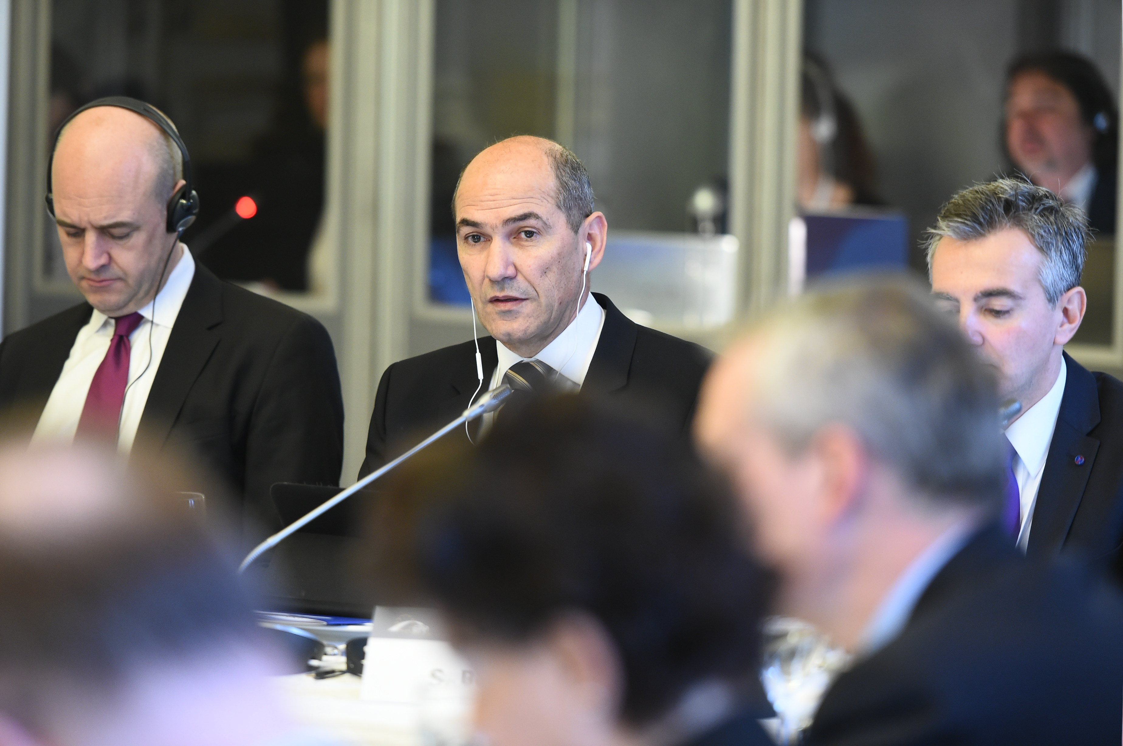 EPP Summit, Brussels; December 2014